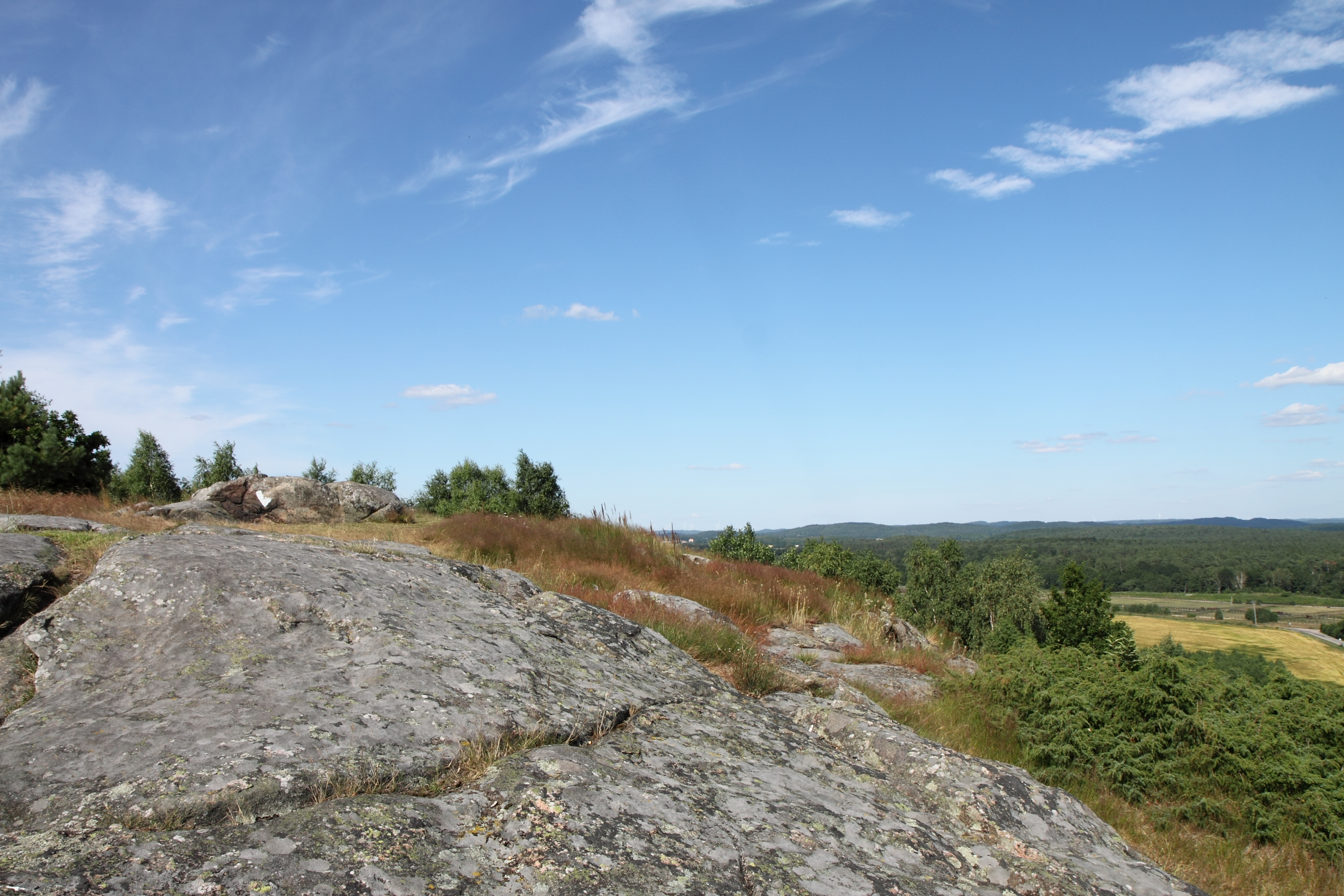 Smörkullens topp i naturreservatet Smörkullen.